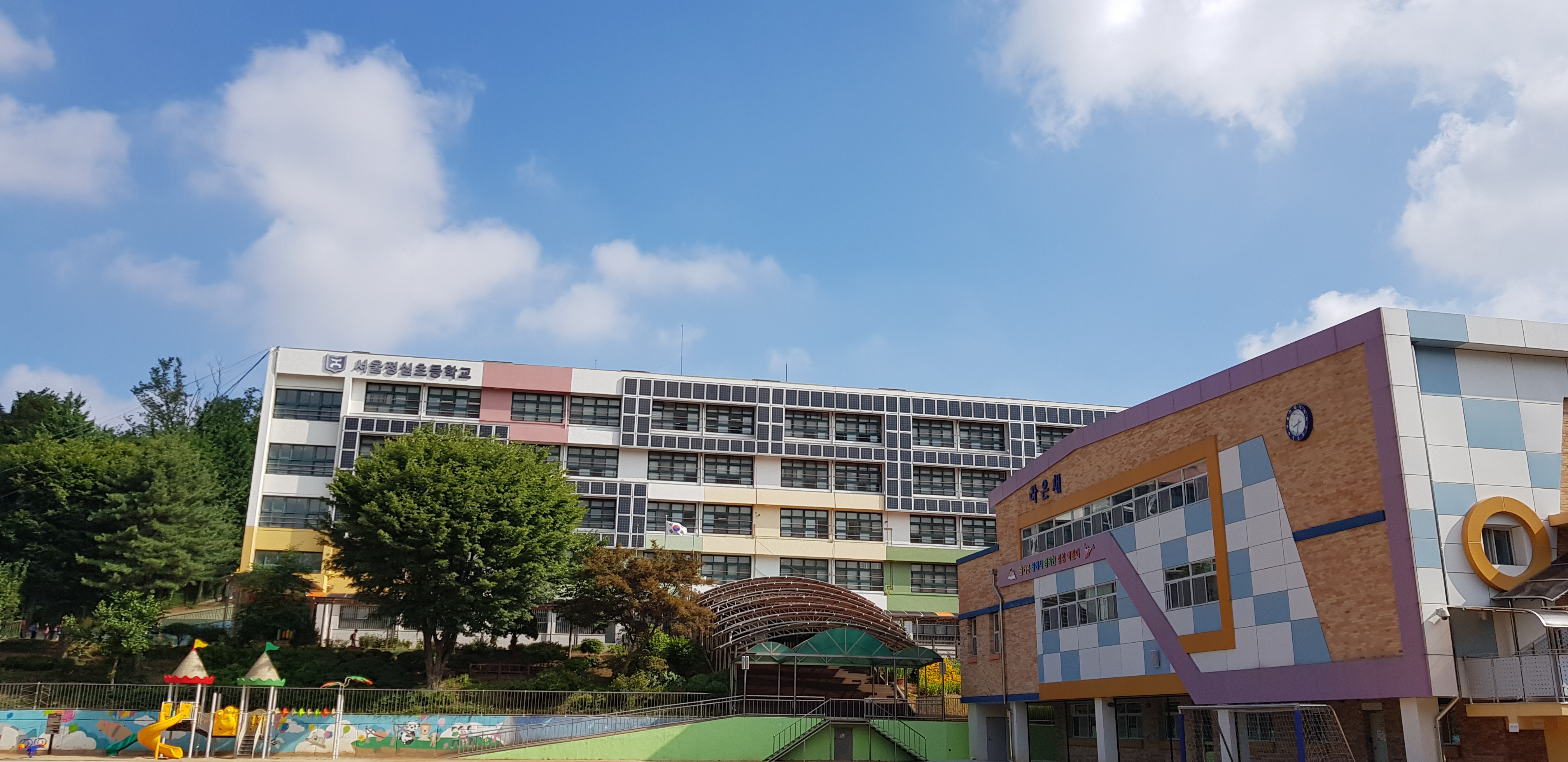 서울정심초등학교